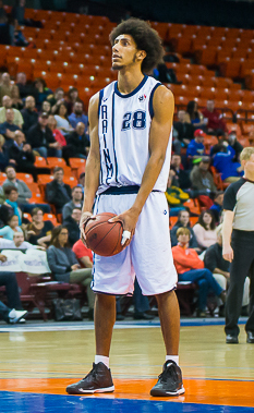 _TMP1790